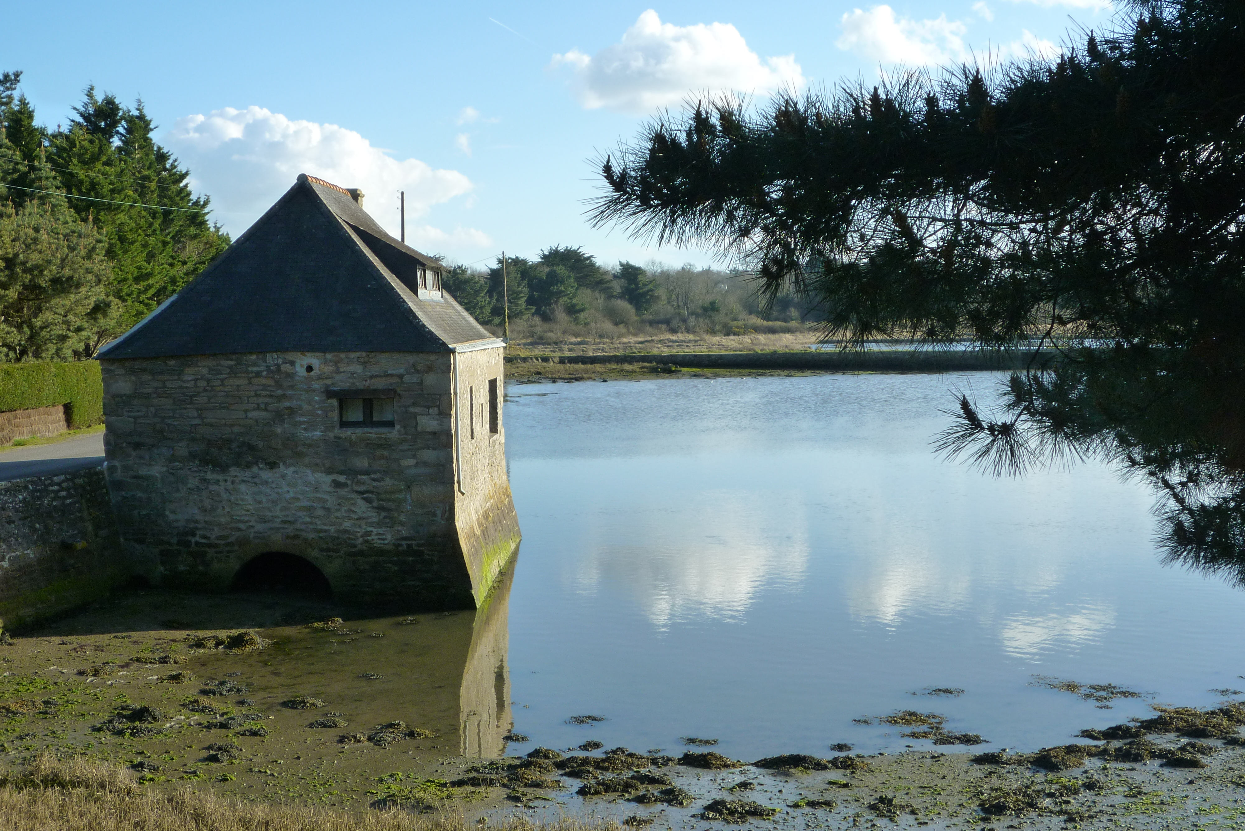 Moulin à marée du Hézo